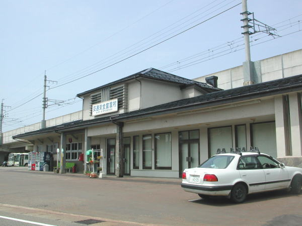 東頚バス浦川原営業所（本社・旧頸城鉄道浦川原駅）